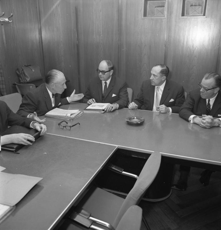 Tarifgespräch: Bund (BMI Lücke) Tarifgem. Dt. Länder (Min. Qualen) Vereinigeung Kommunaler Arbeitgeberverbände (OB Klett)